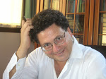 Antonio Felici